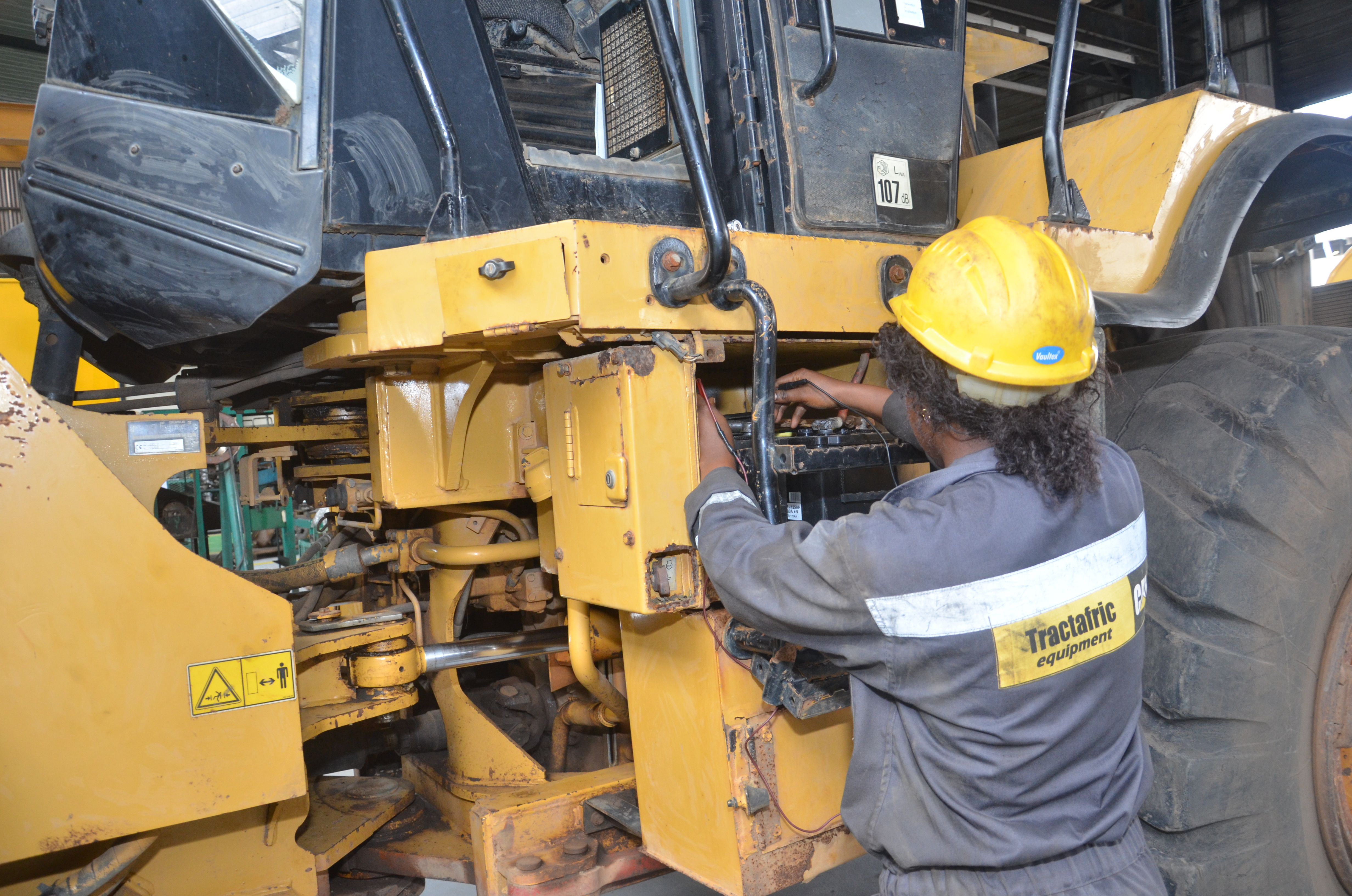 Femme mécanicienne d'engins lourds dans une entreprise située à Douala